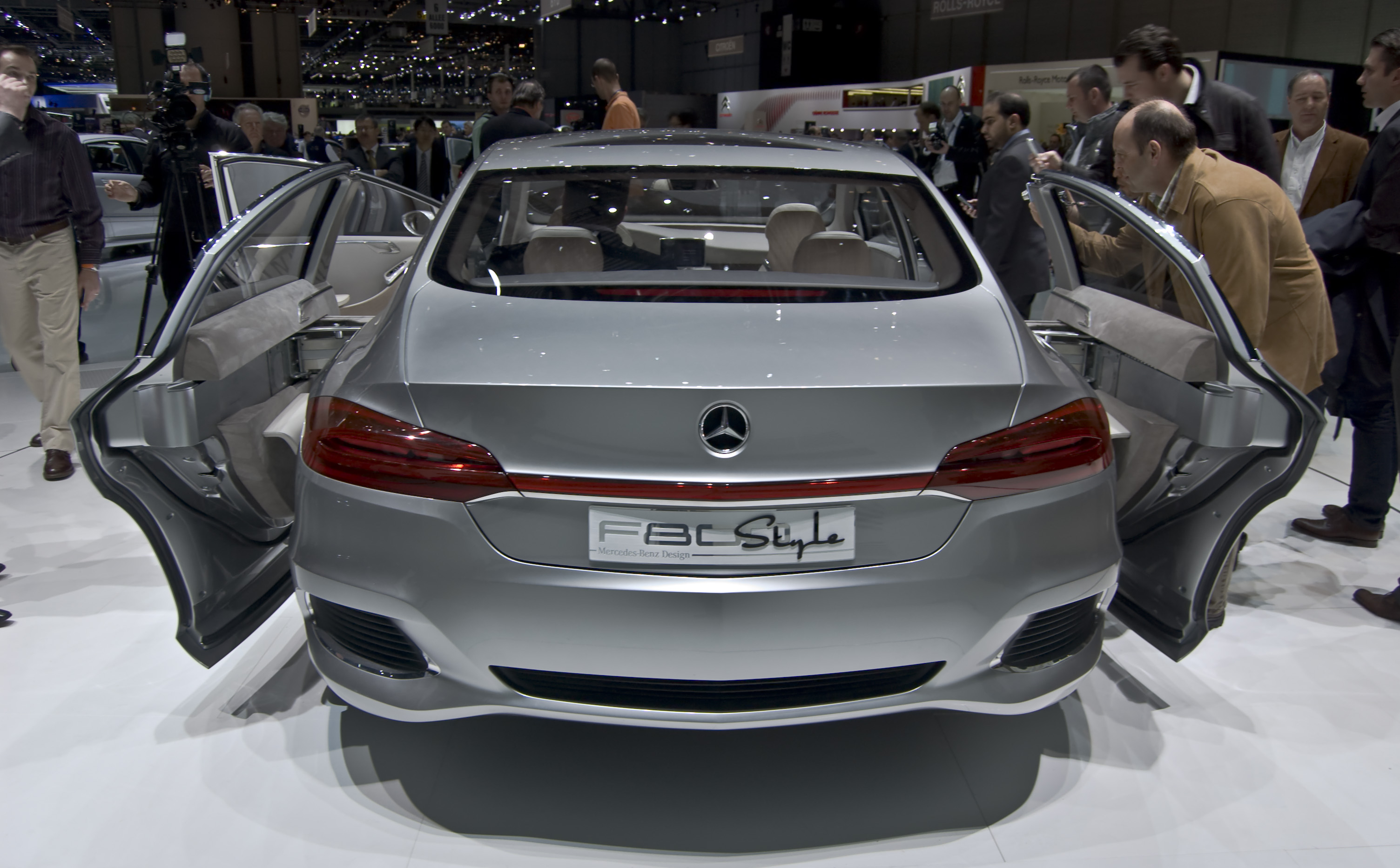 Mercedes-Benz F800 Style, un adelanto de la nueva generación del Mercedes-Benz CLS. Mercedes-Benz F800 Style previews the next generation Mercedes-Benz CLS.